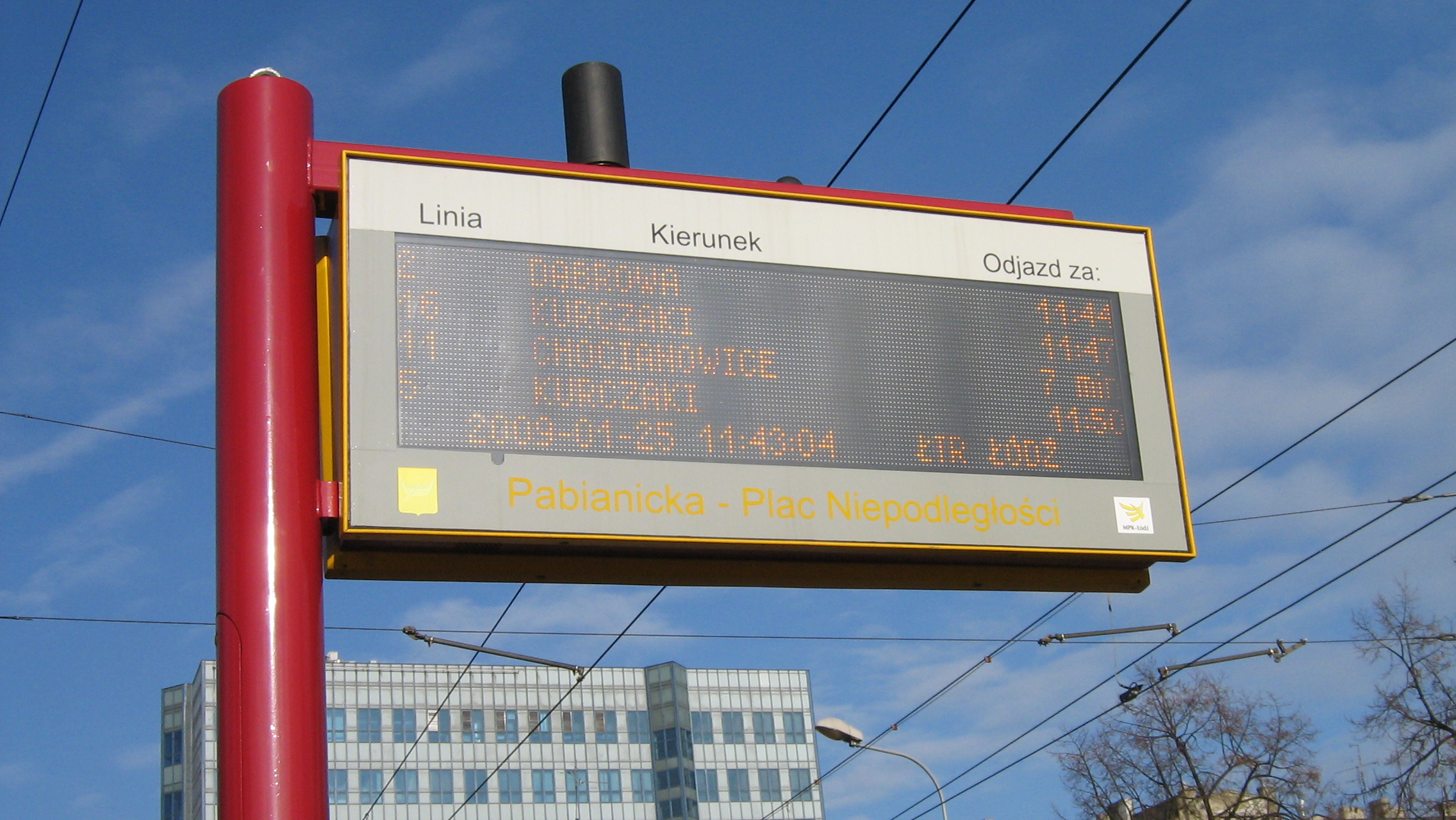 Tablica informacyjna na przystanku ŁTR w Łodzi.